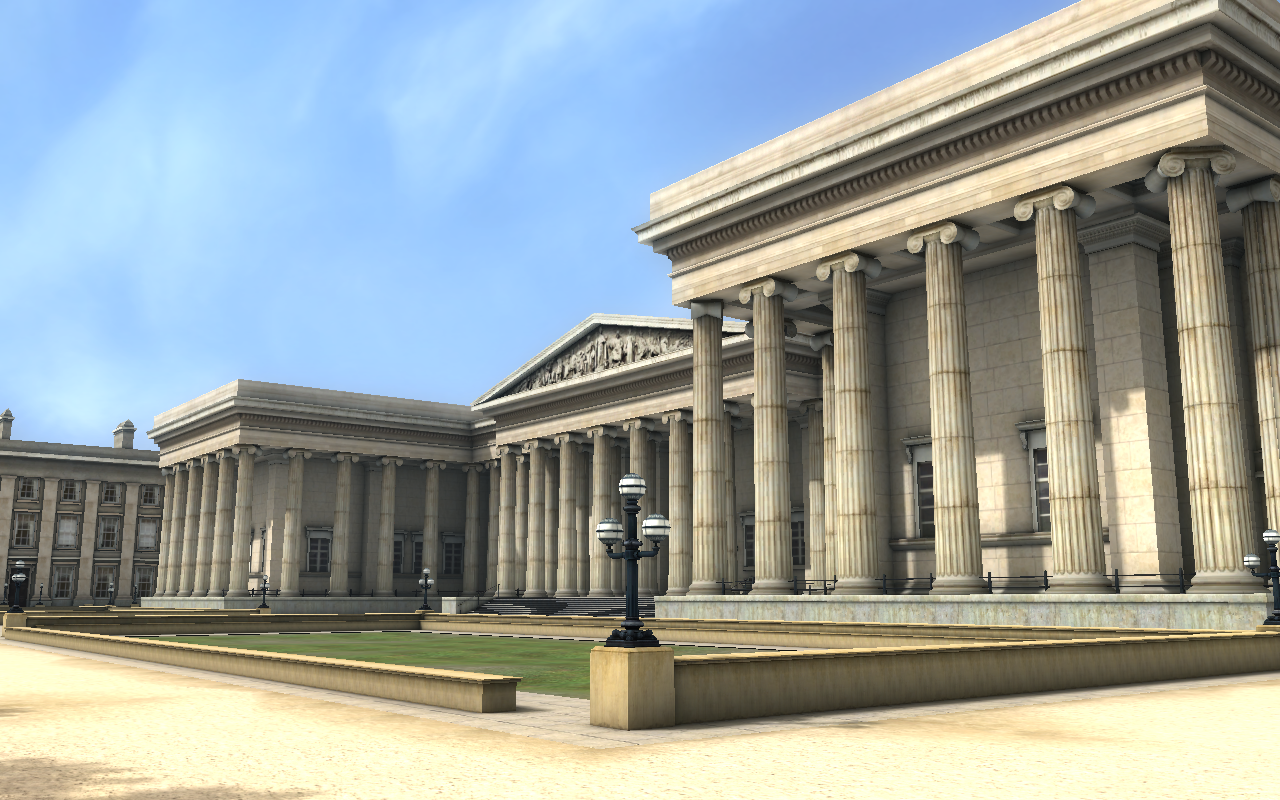 Capture d'écran du jeu Sherlock Holmes contre Arsène Lupin. On y voit le British Museum, magnifiquement reconstitué.